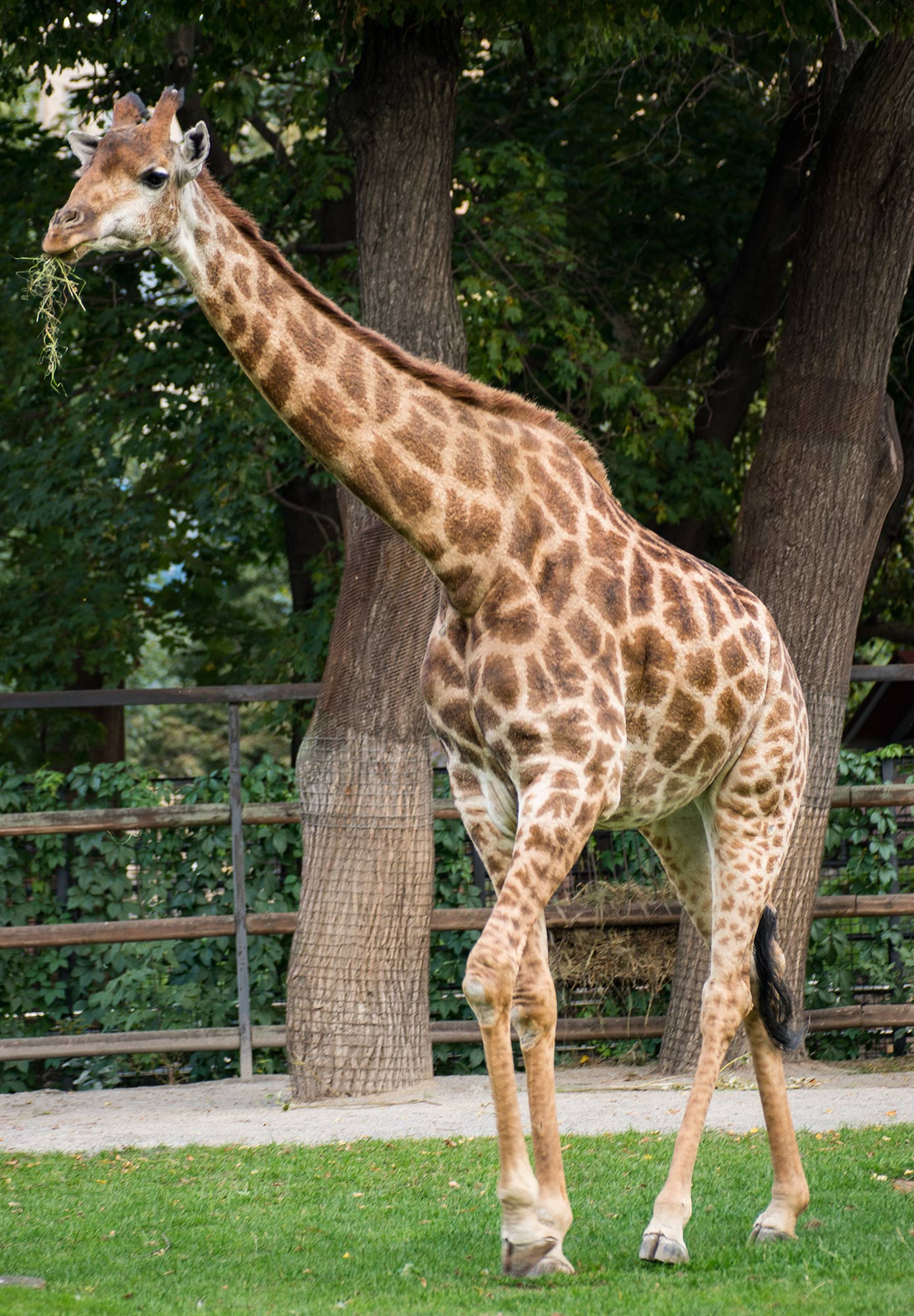 Южноафриканский жираф в Московском зоопарке